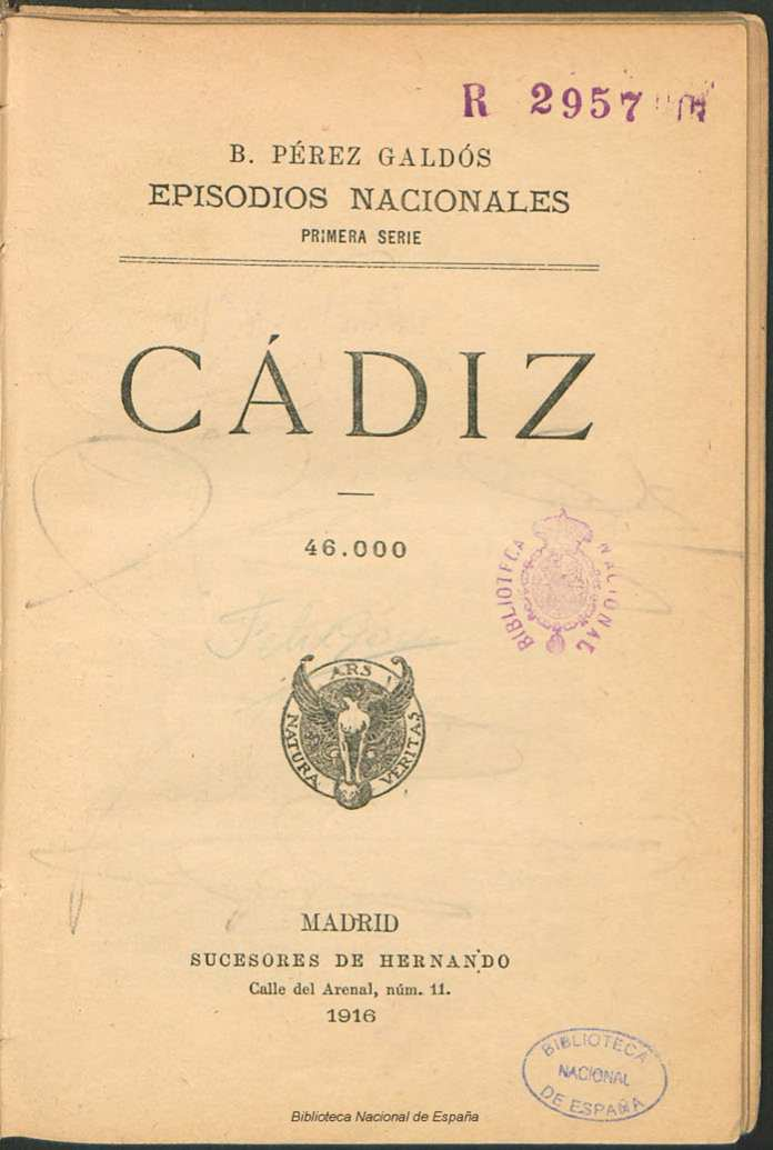 Cádiz Autor: Pérez Galdós, Benito (1843-1920) Fecha: 1916 Datos de edición: Madrid, Librería de los Sucesores de Hernando